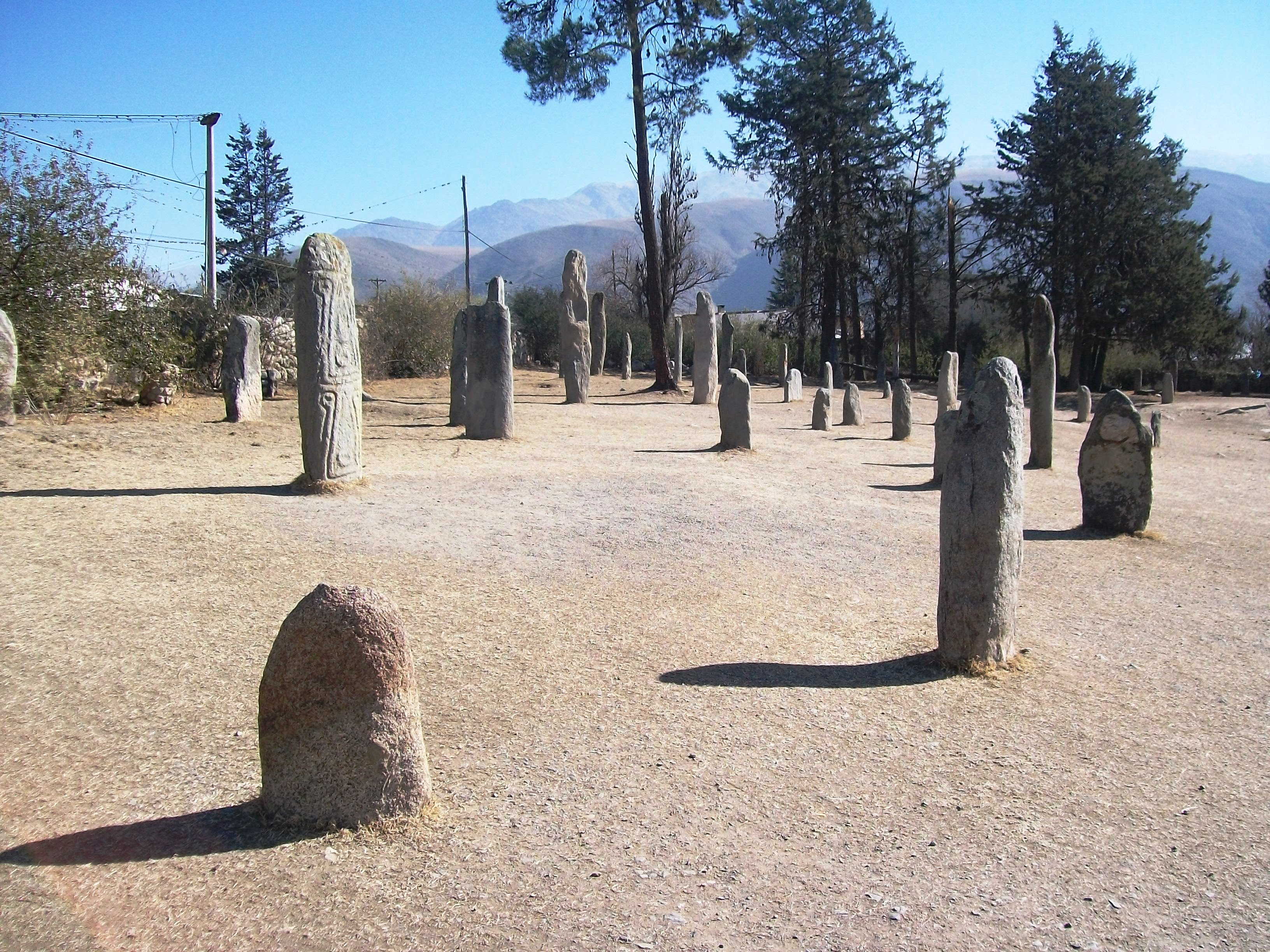 Vista parcial del parque de la Reserva Arqueológica de los Menhires, El Mollar, Departamento de Tafí del Valle, provincia de Tucumán, Argentina.